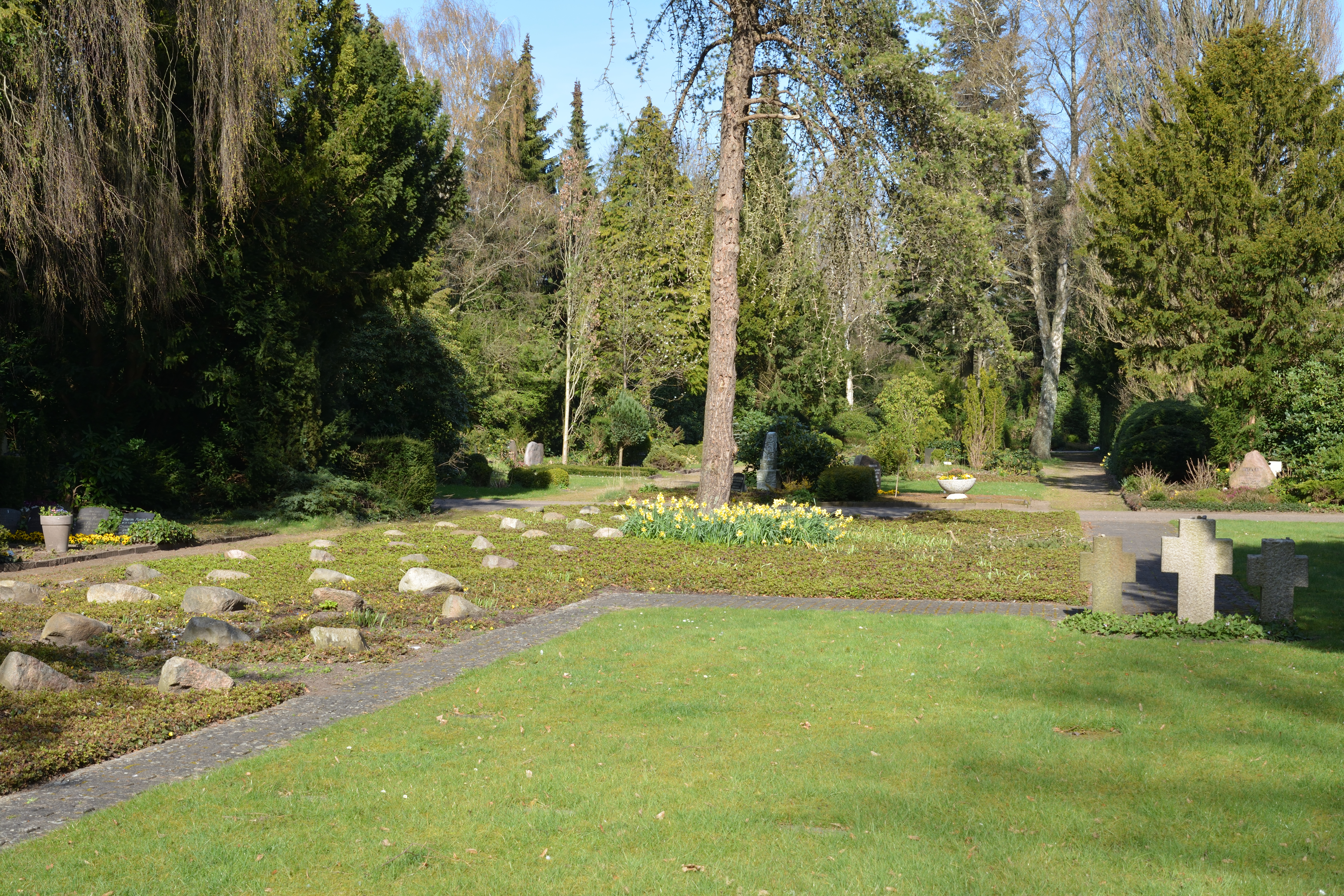 Bilder vom Nordfriedhof in Neumünster